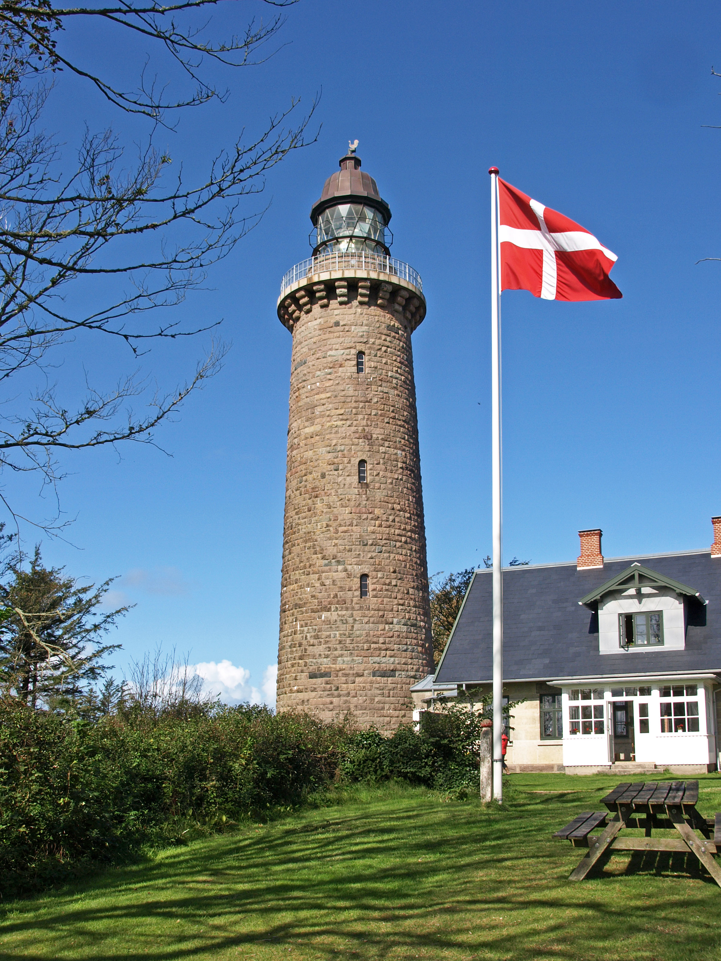 Leuchtturm Lodbjerg